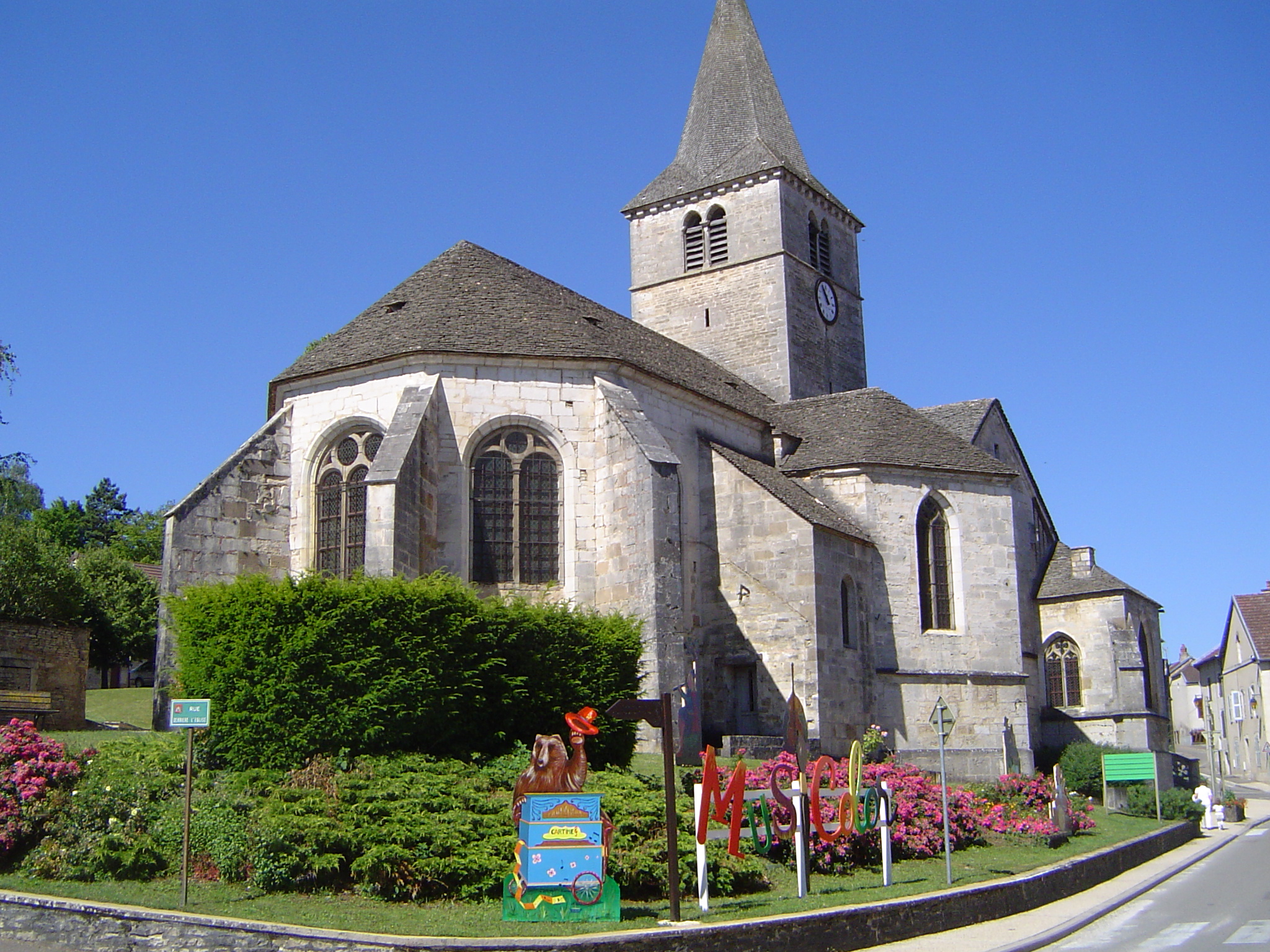 église de Selongey